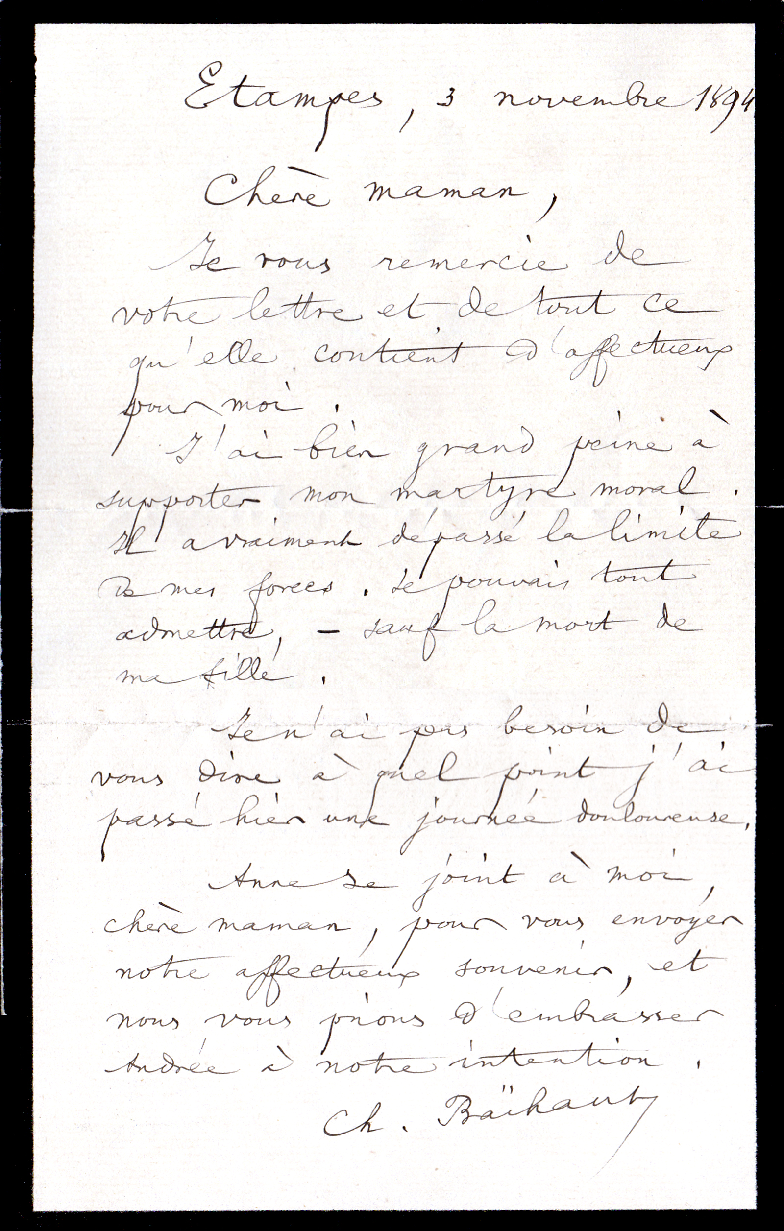 Prison d 'Etampes. Lettre de Charles Baïhaut à sa belle mère.